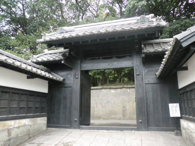 島津家の玉里邸です。鹿児島女子高校の敷地ですが、見学も出来ます。